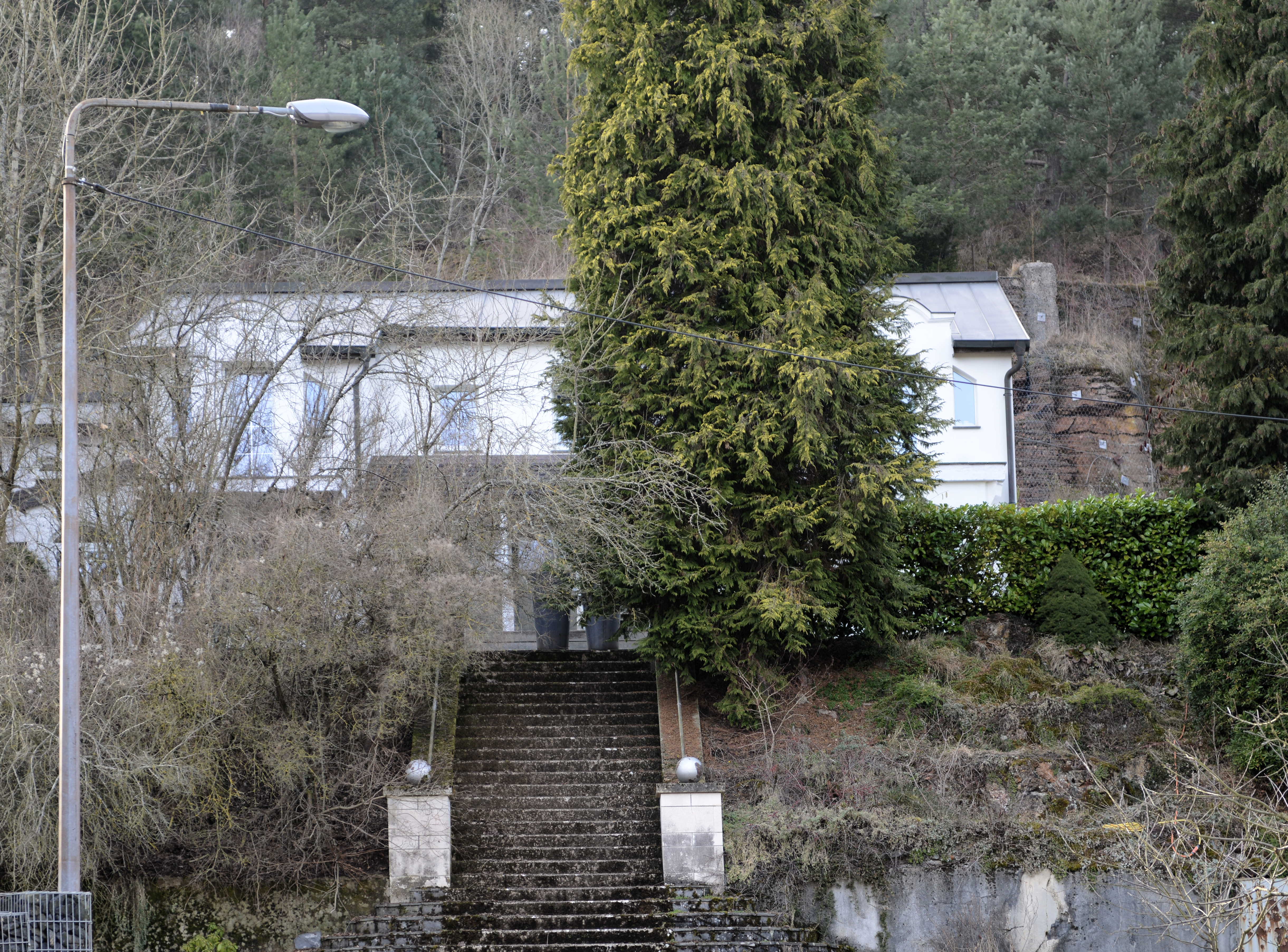 D'«Villa Jack Müller», am Burgronn zu Esch, no Ëmbauten ass net vil méi wéi d'Trap original.